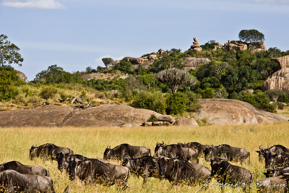 Bariadi, Tanzania